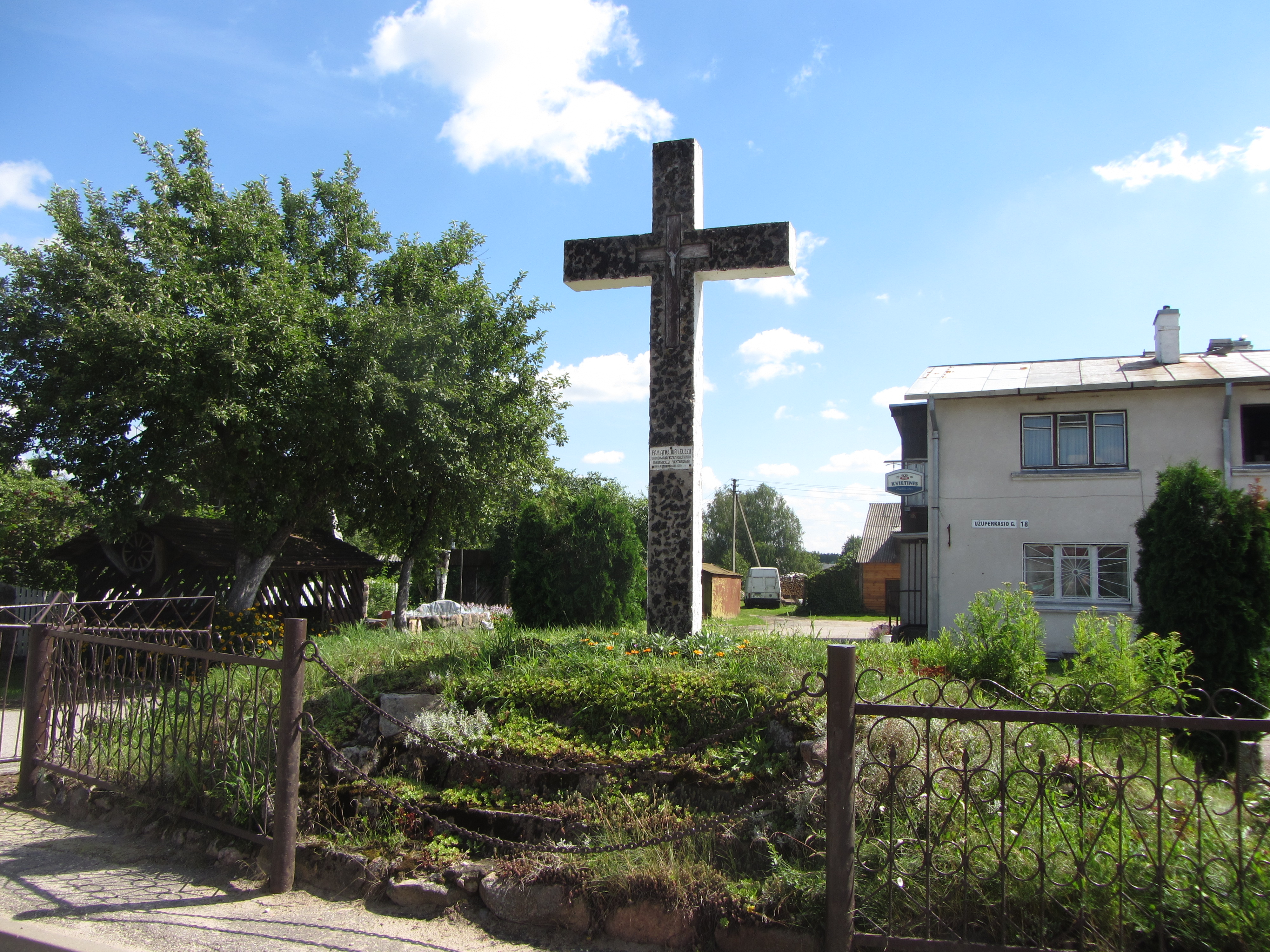 Užuperkasis, Lithuania